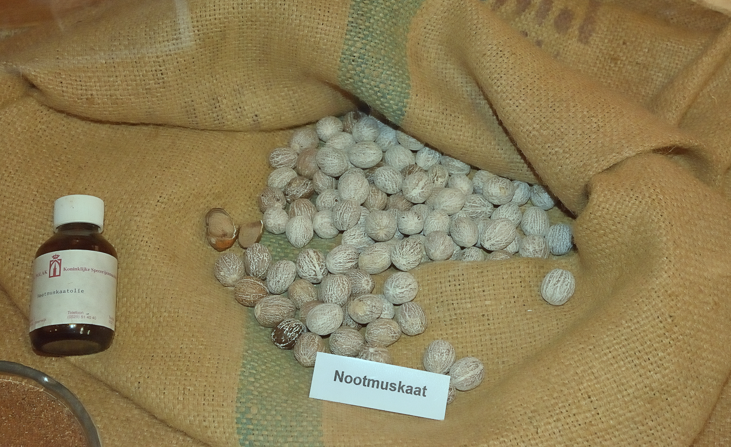 De Wachter, Zuidlaren, nootmuskaat